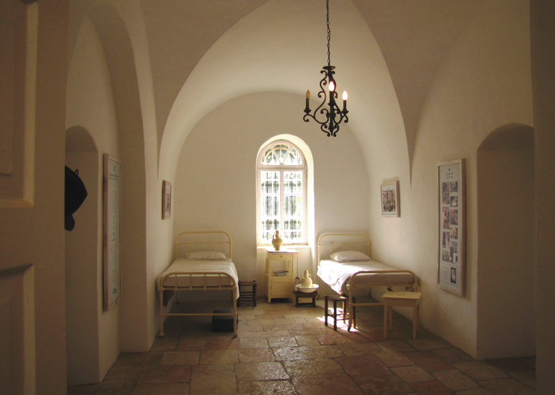 בית החולים הממשלתי ע"ש הנסן (בעבר בית החולים למצורעים עזרת ישו) היה מרכז טיפולי לחולים במחלת הנסן (צרעת) בשכונת טלביה. עד 2002 פעל כמרפאת חוץ, ושיכן את המרכז הארצי למחלת הנסן של משרד הבריאות. במקום מוזיאון על היסטוריית בתי החולים בירושלים.